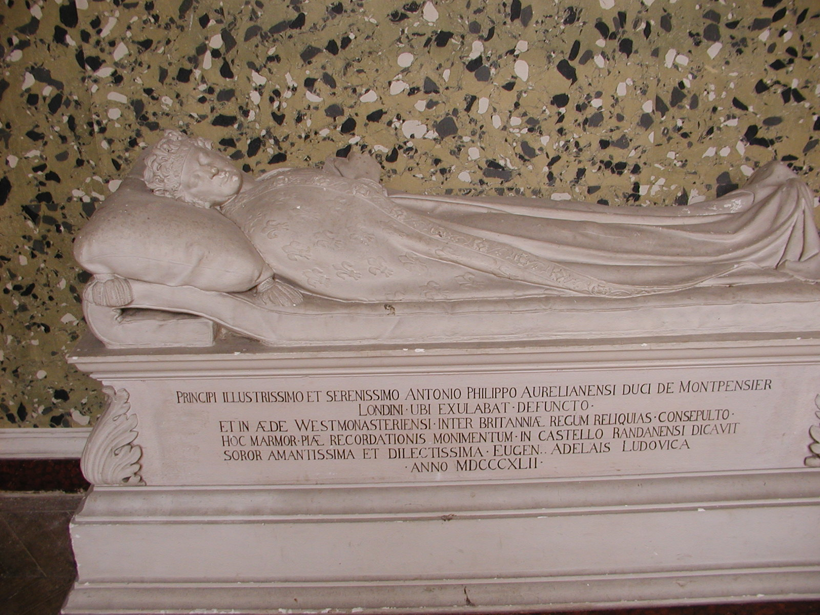 Cénotaphe d'Antoine d'Orléans (1775-1807)